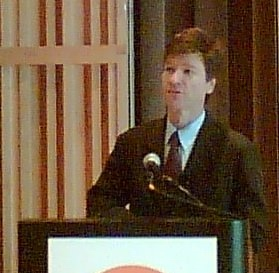 Jeffrey Sachs